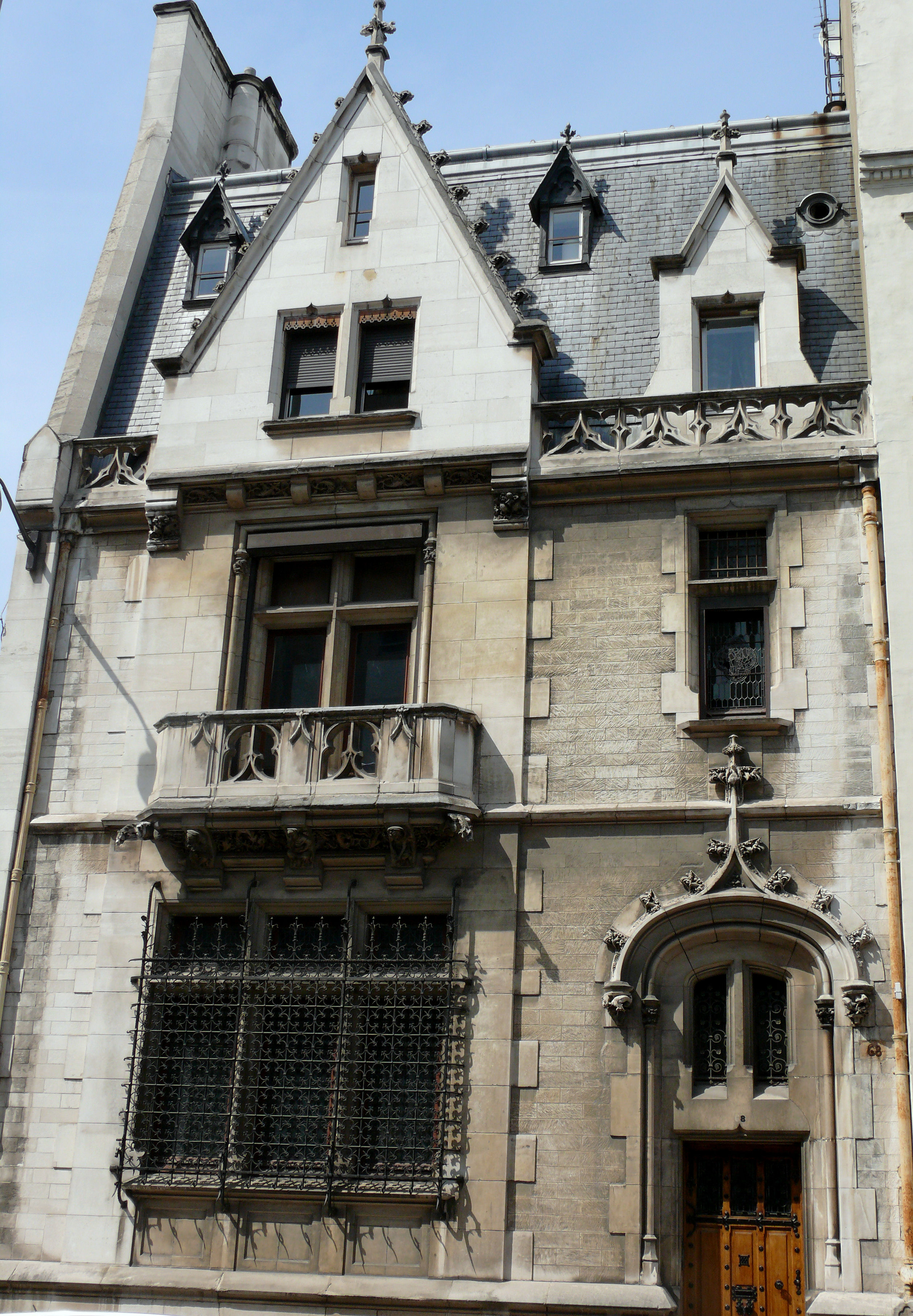 Paris 17ème arrondissement - Hôtel particulier 68 rue Ampère